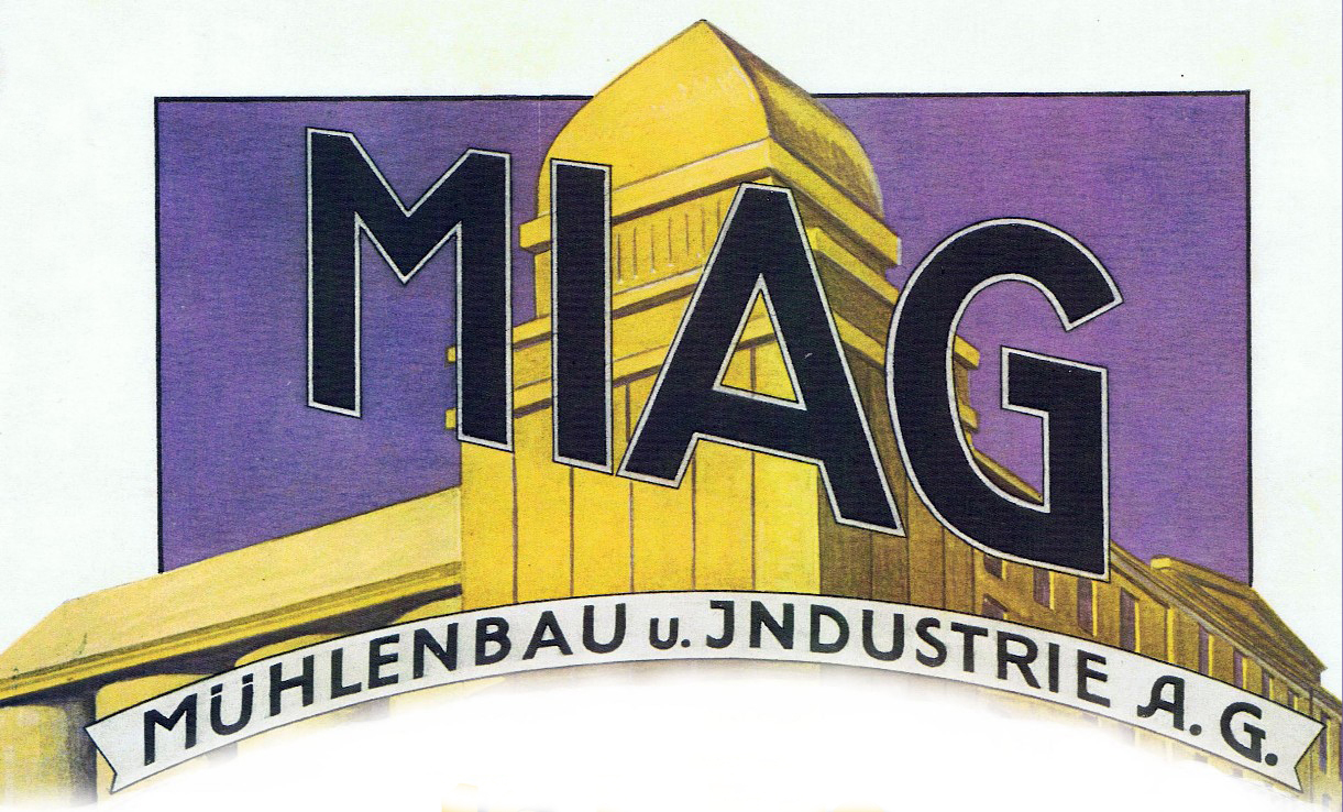 Die MIAG Mühlenbau und Industrie Aktiengesellschaft war ein Maschinenbauunternehmen im Ober-Ramstadt.